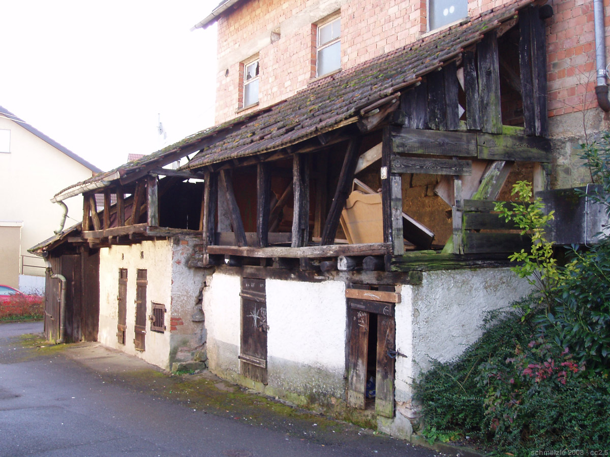 Historische Kleintierställe in der Rappengasse 6 in Heilbronn-Biberach